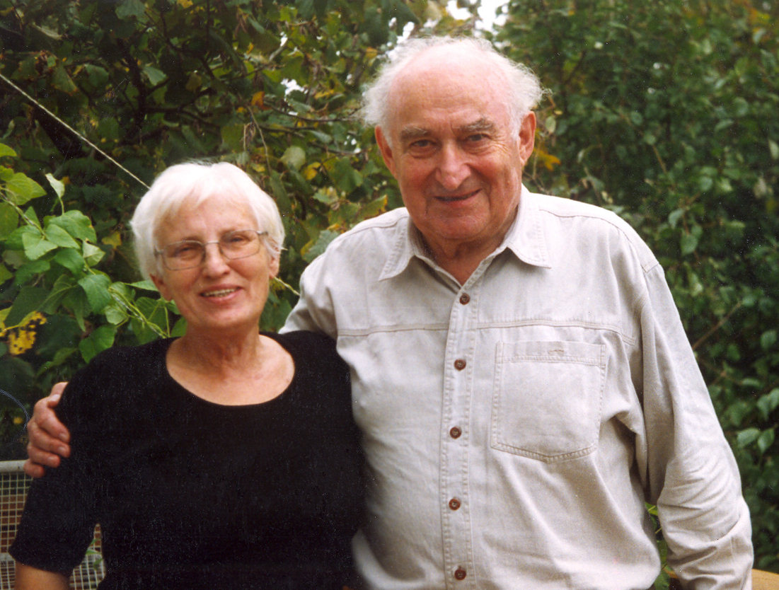 Otto Graff und Irmgrad Graff, 1997